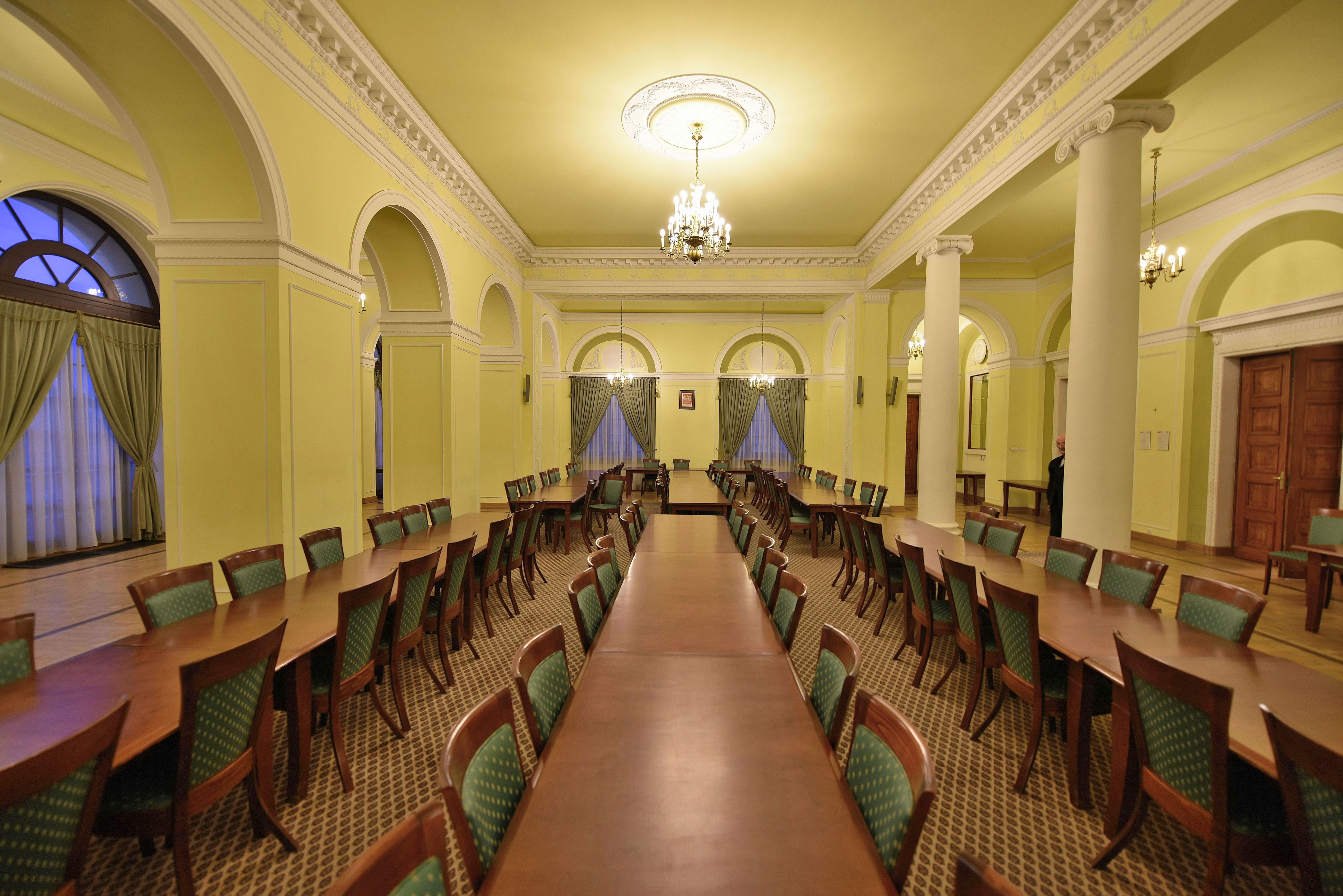 Sala Stefana Starzyńskiego w pałacu Ministra Skarbu w Warszawie